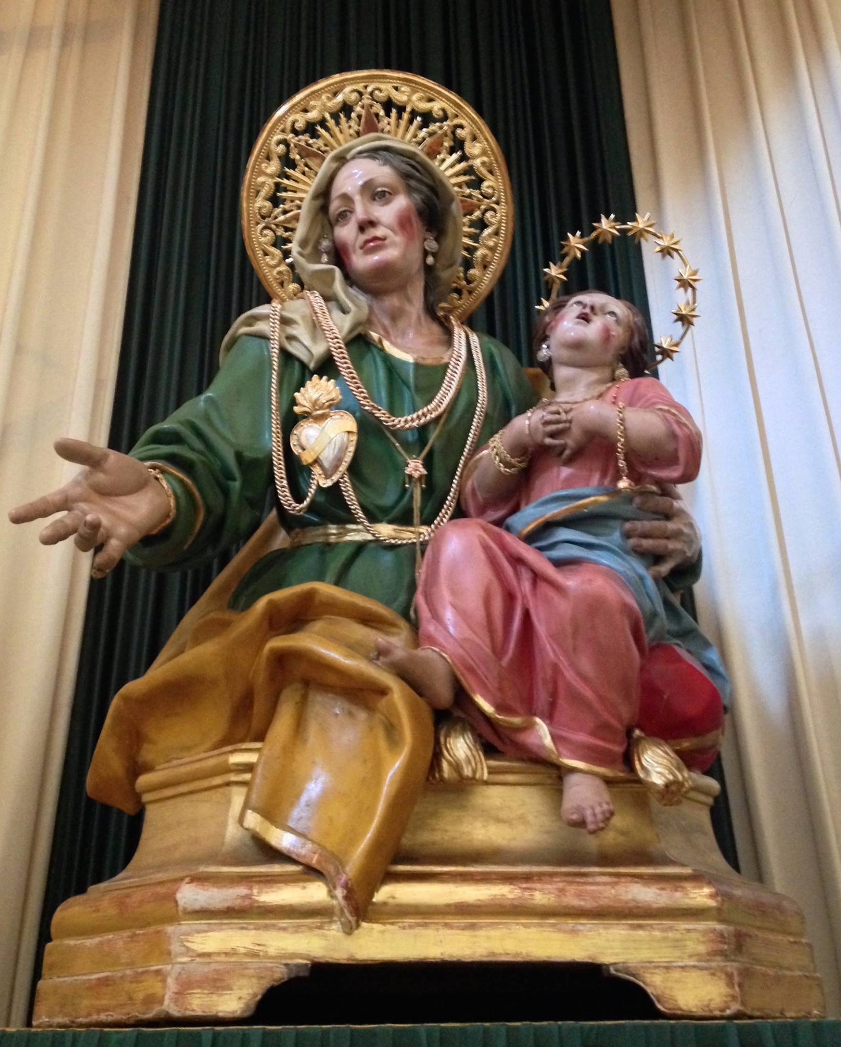 Immagine di Sant'Anna alle Paludi dello scultore Giuseppe Picano